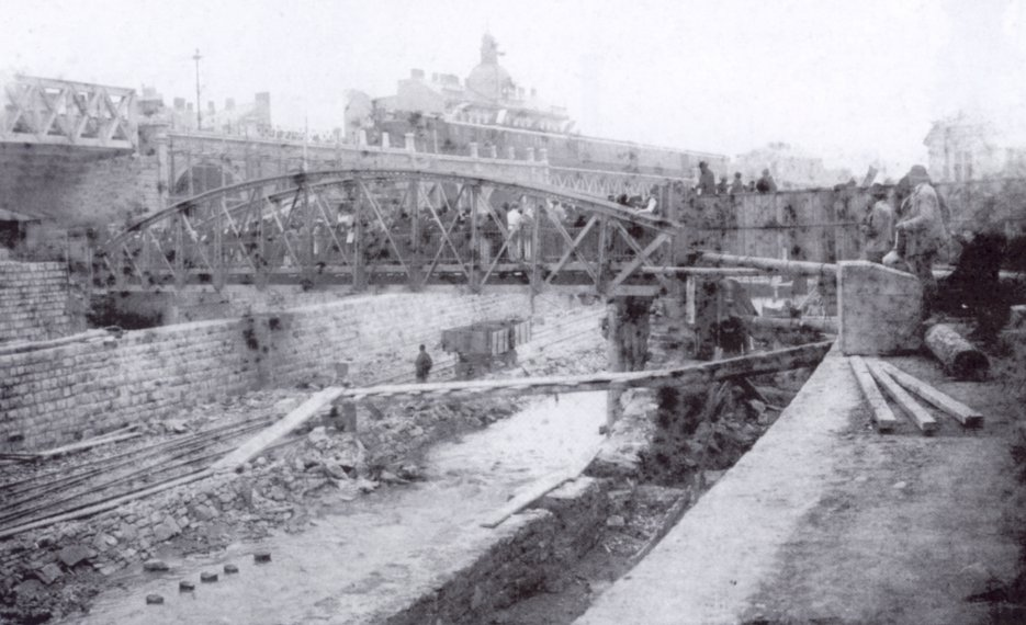 Der Kobingersteig über den Wienfluss im Jahre 1898